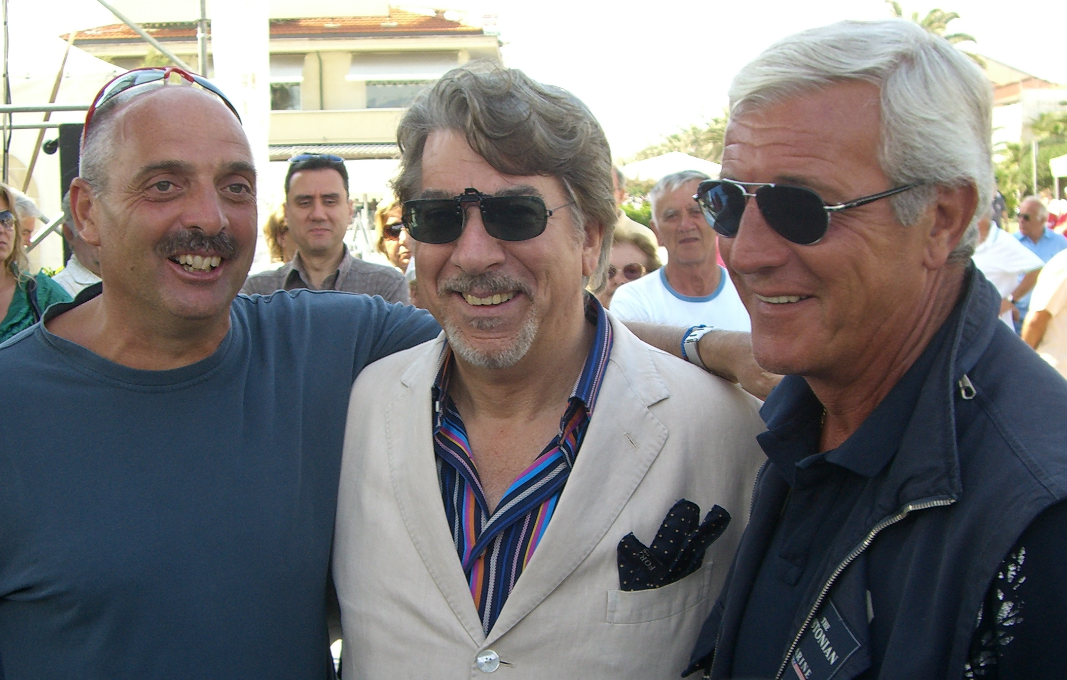 Il giornalista Paolo Brosio, il presentatore Marco Columbro e l'allenatore di calcio Marcello Lippi